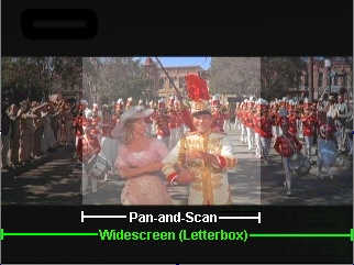 Menu de opciones de un sintonizador de TDT